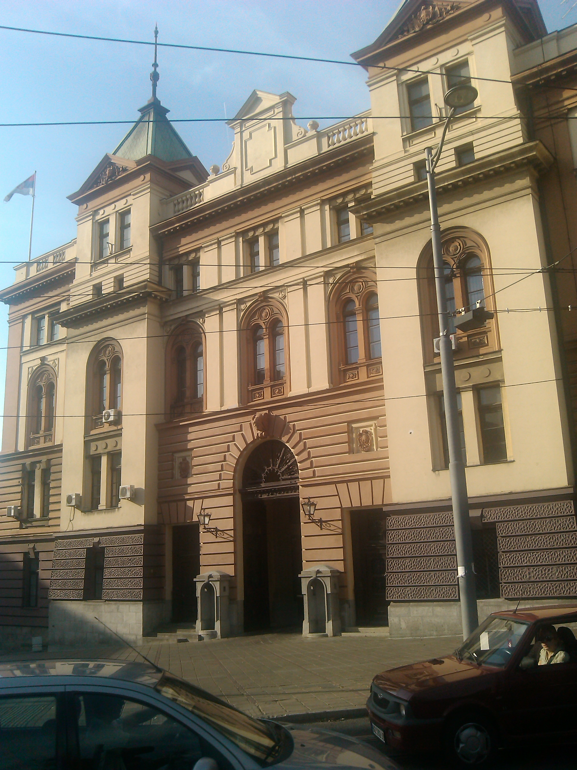 Касарна 7. пука